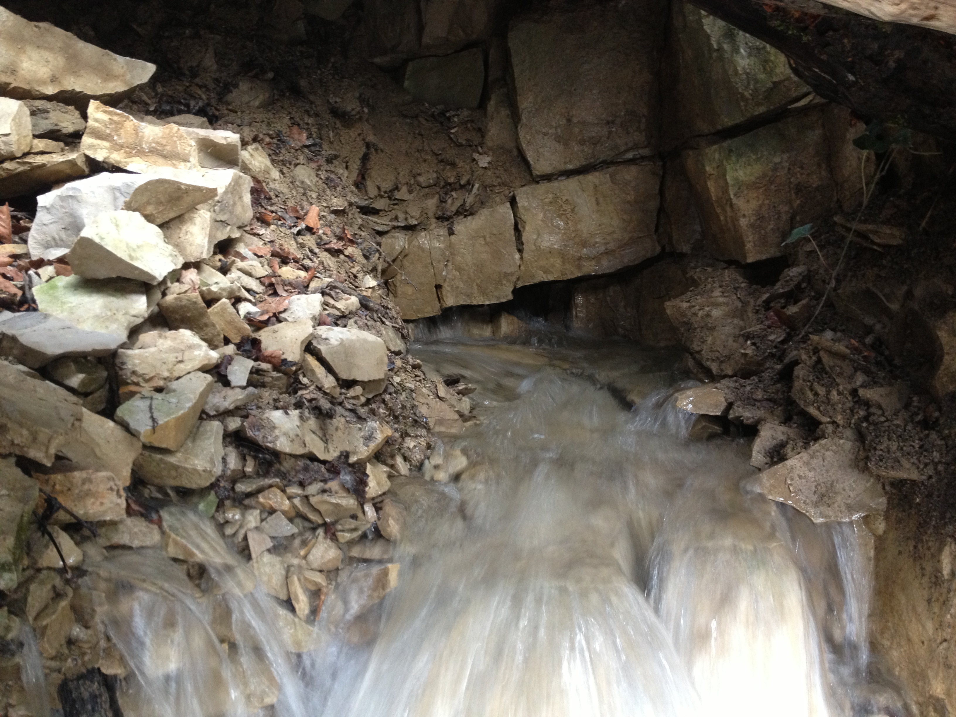 Periodische Quelle (Bröller) des Zellerbachs am Albtrauf oberhalb von Mariazell, dessen Wasser über den Reichenbach und die Starzel in den Neckar fließt